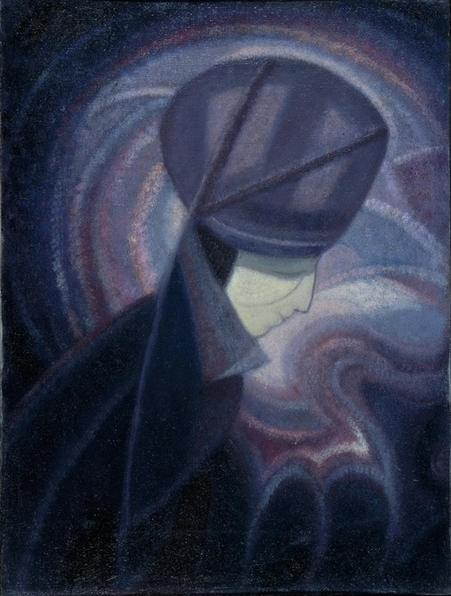 Madonna